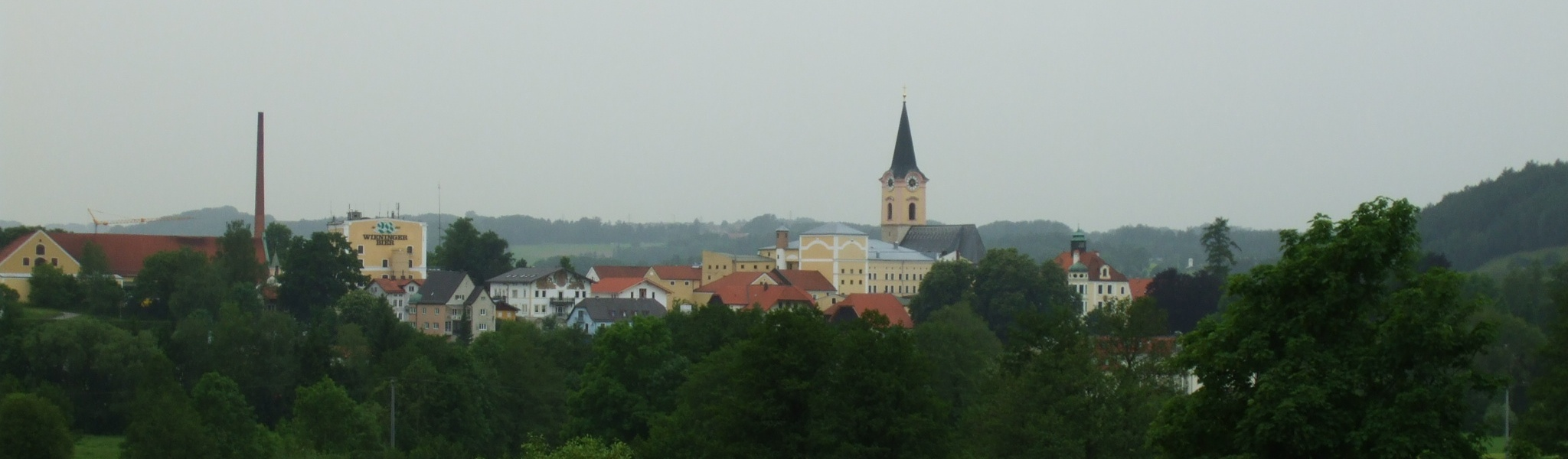 Teisendorf bei Traunstein (Bayern)